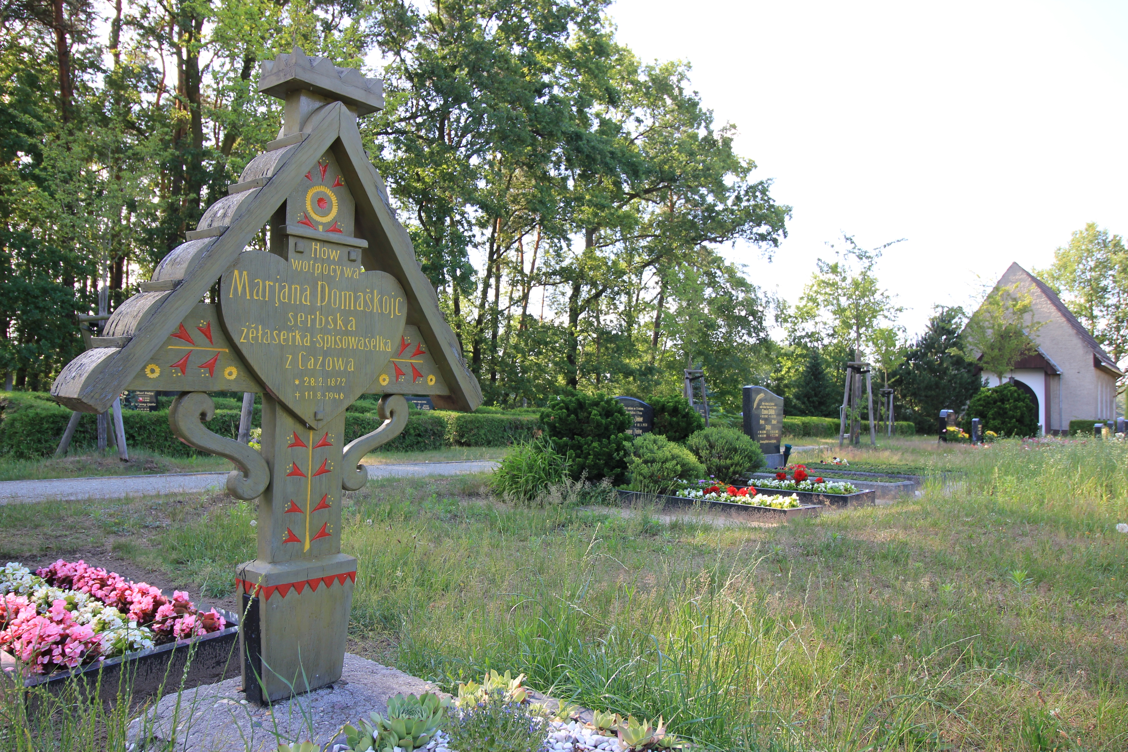 Hornjoserbsce: Row Marjany Domaškojc w Cazowje; drjewjany křiž wuhotowany wot Měrćina Nowaka-Njechorńskeho.